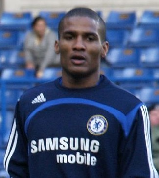 Florent Malouda